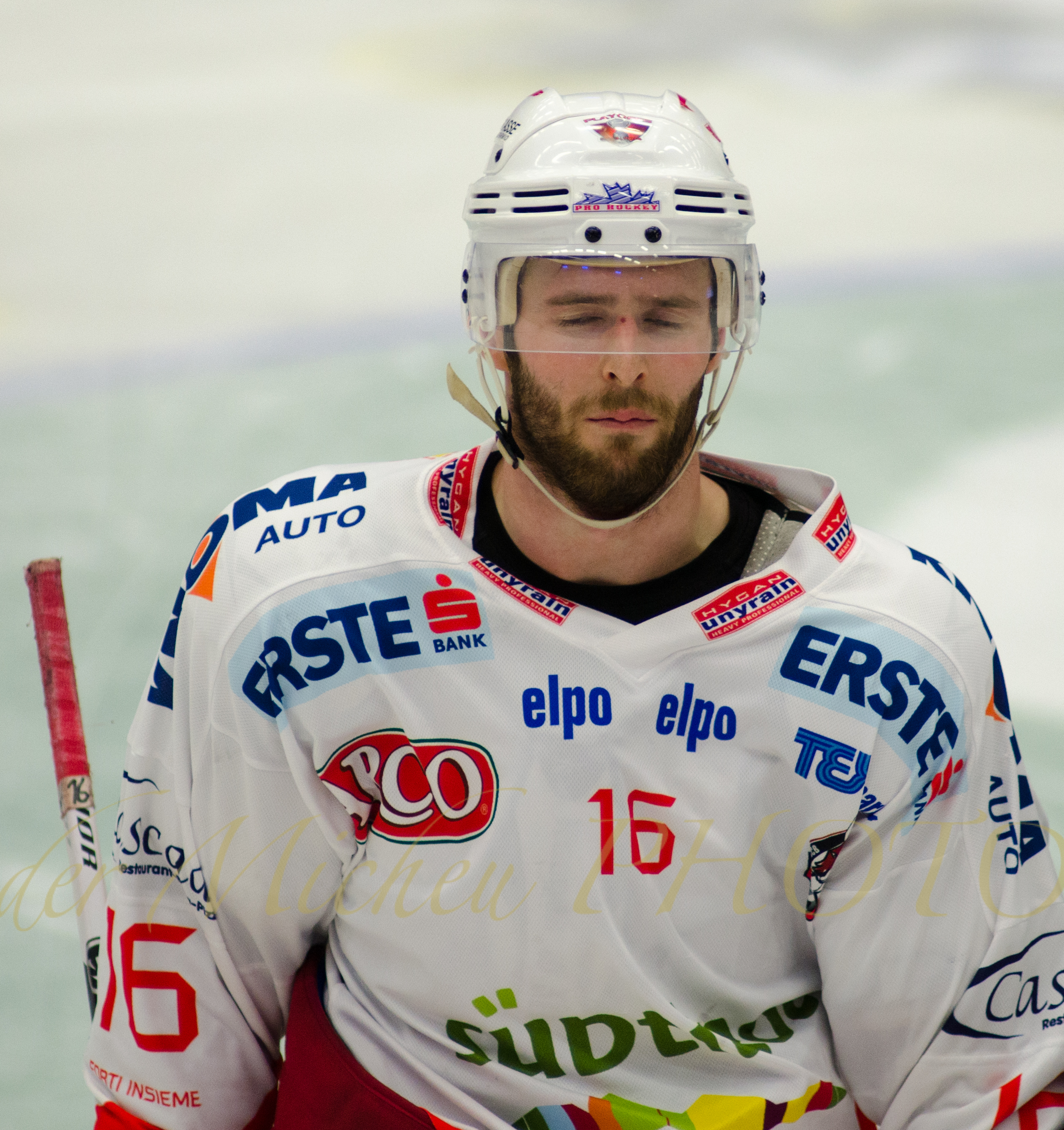 hockey pictures-micheu-EC VSV vs HCB Südtirol 03252014 (57 von 180)